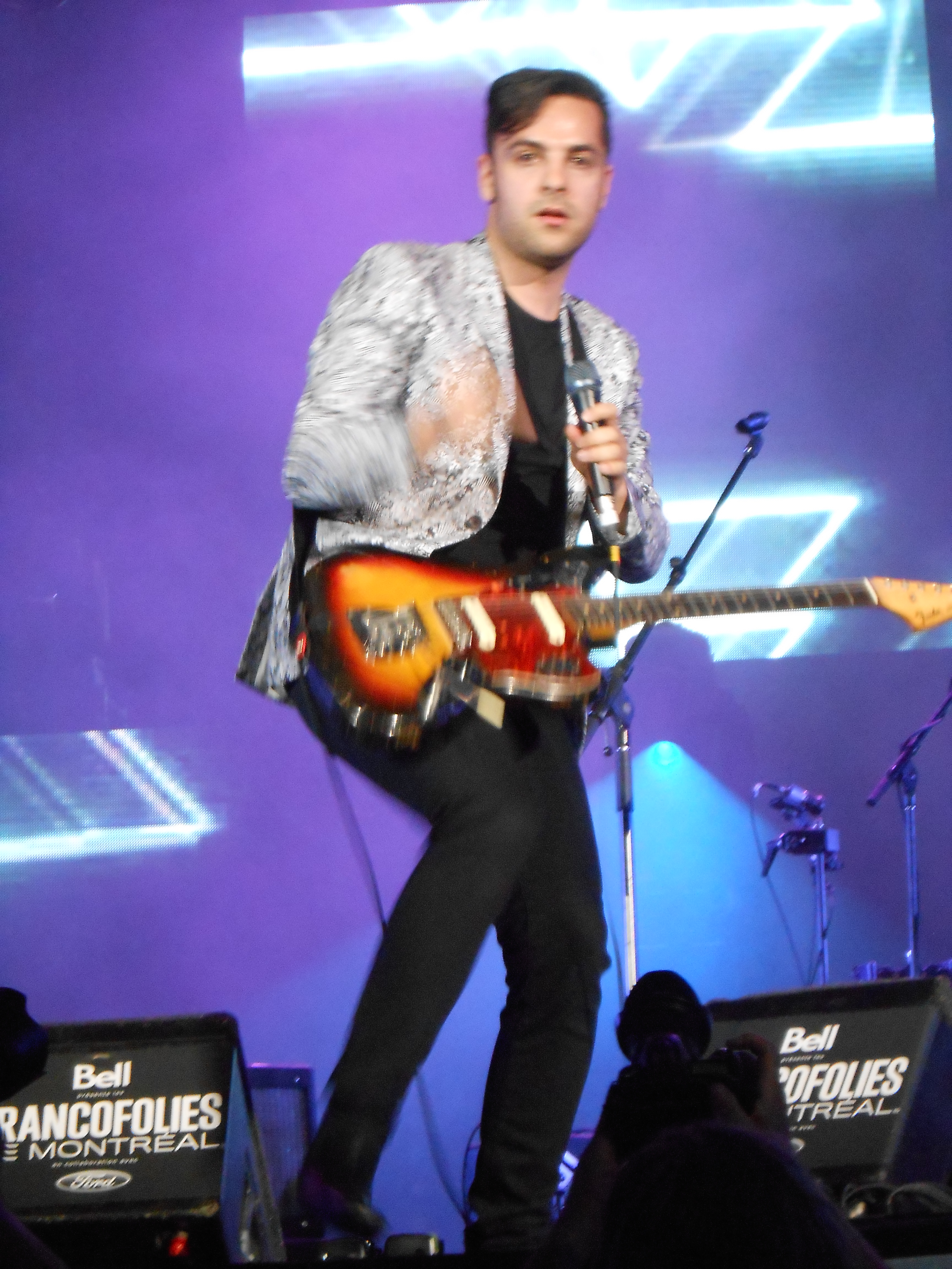 Dumas a offert une performance aux FrancoFolies de Montréal, le 14 juin 2013, à la place des Festivals.